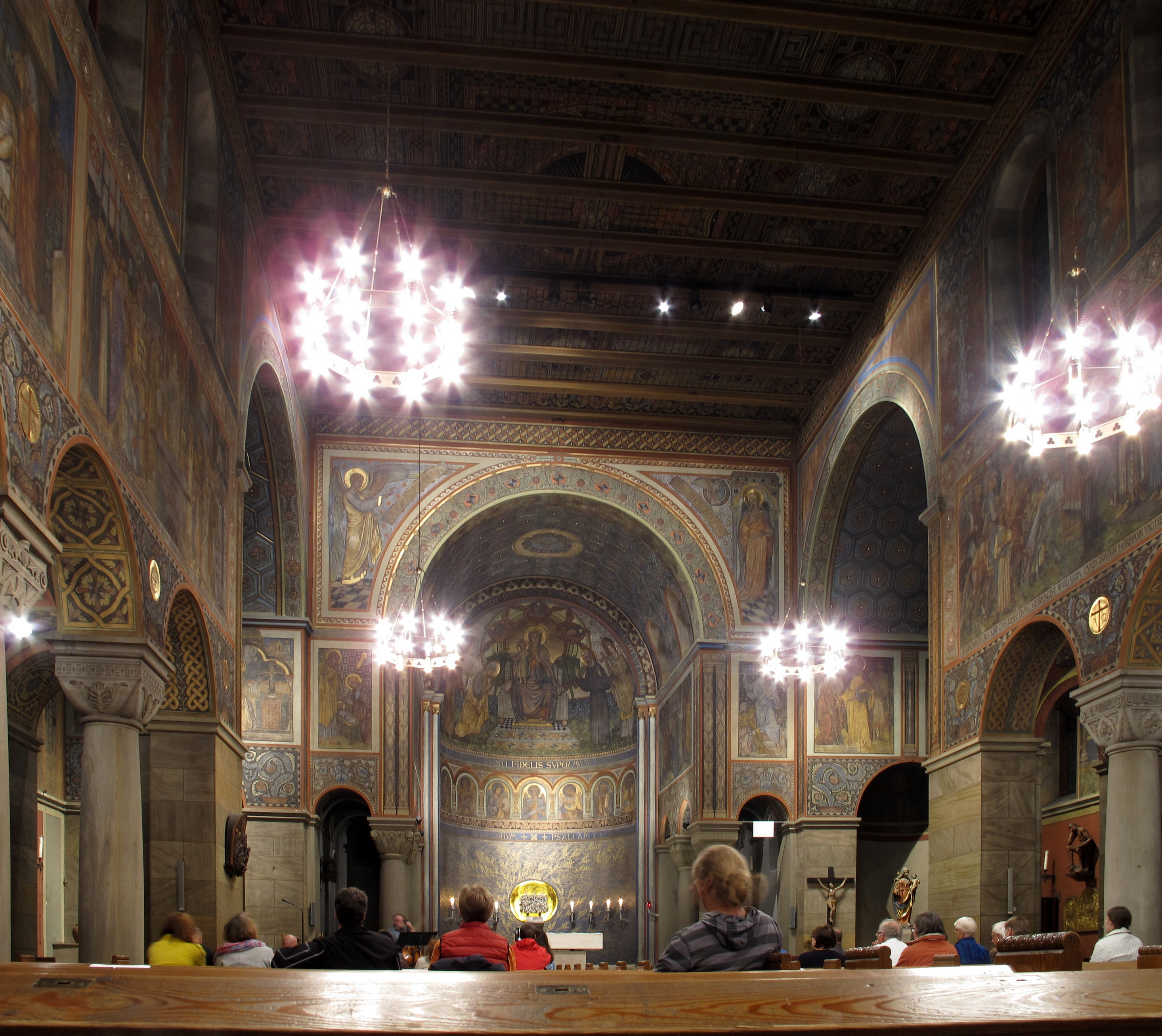 Hannover: Kirche St. Elisabeth (innen)